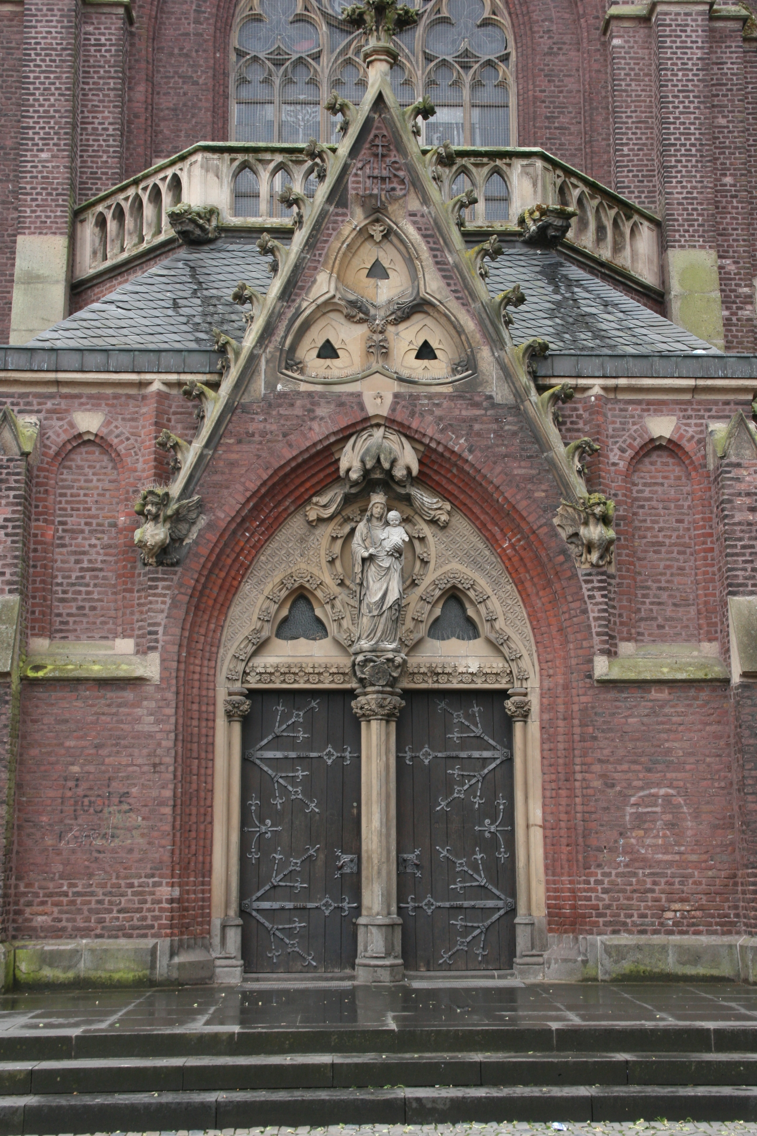 St. Cornelius, Börsenstraße in Dülken, Viersen